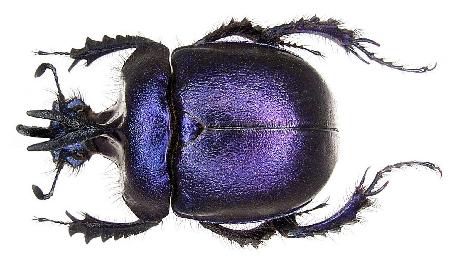 Familie: Geotrupidae Groesse: 32 mm Fundort: Thailand, Chiang Noi, 1986 det. U.Schmidt Photo: U.Schmidt, 2006